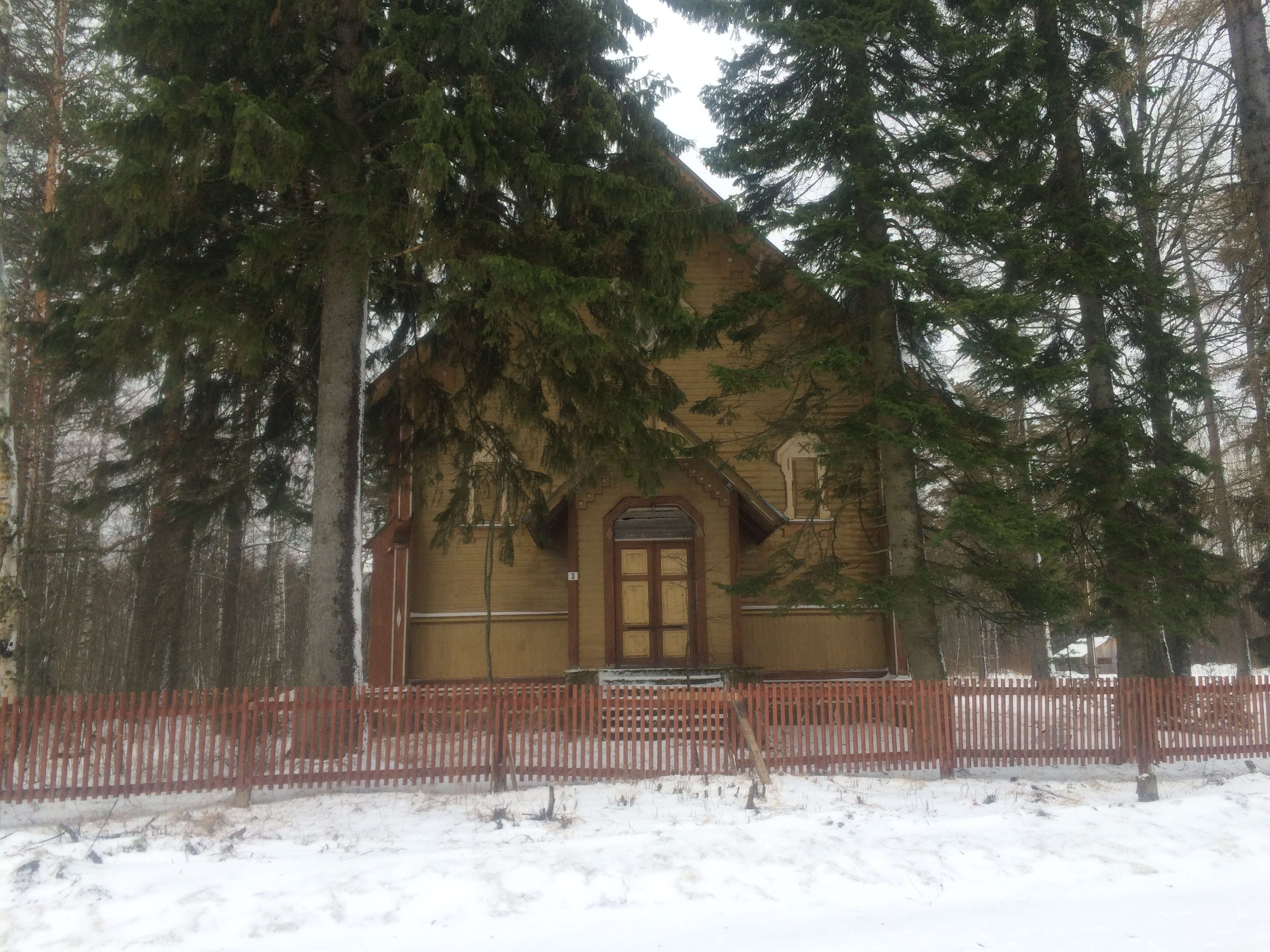 Леппяниеми